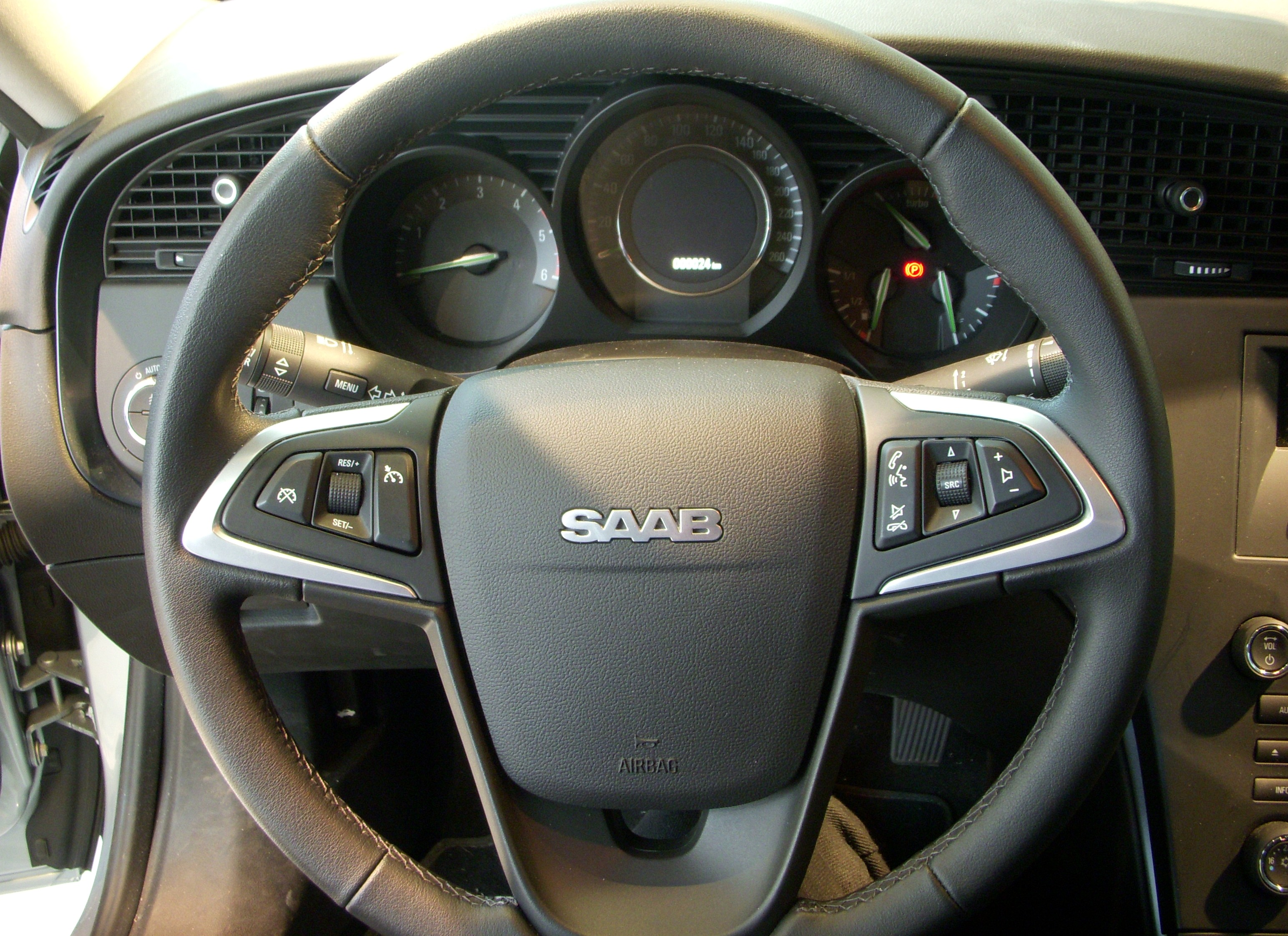 SAAB 9-5 förarplats